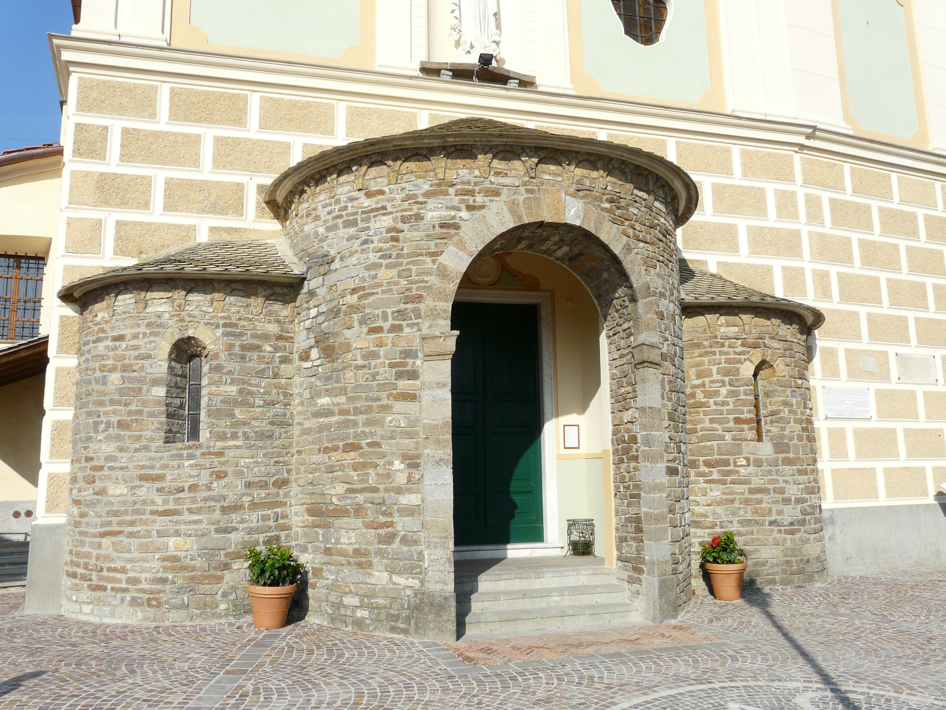 Chiesa di Santa Maria Assunta, Ceranesi, Liguria, Italia